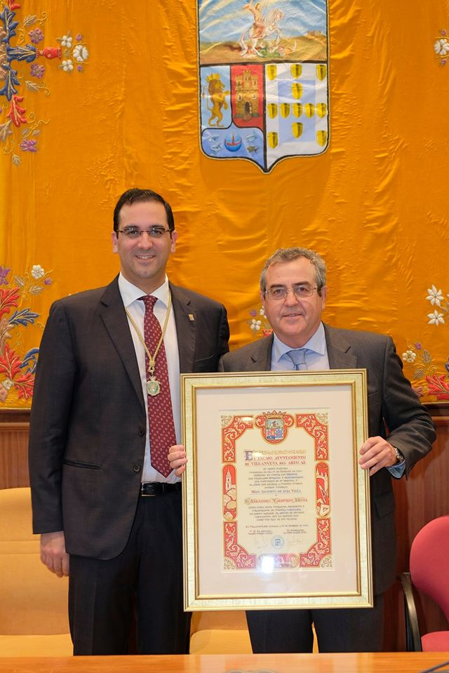 Entrega a Alejandro Valdivieso, del título de hijo Adoptivo de la Localidad.